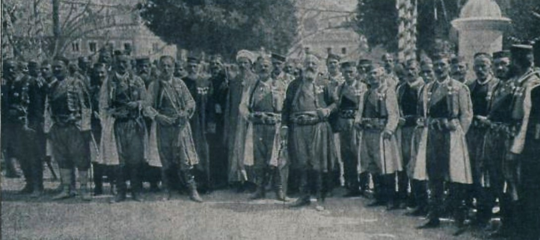 Črnogorska narodna skupščina